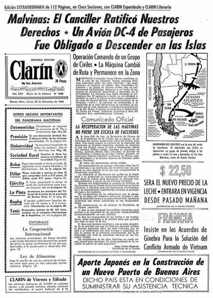 Новость о «вторжении» аргентинских националистов на Фолклендские острова